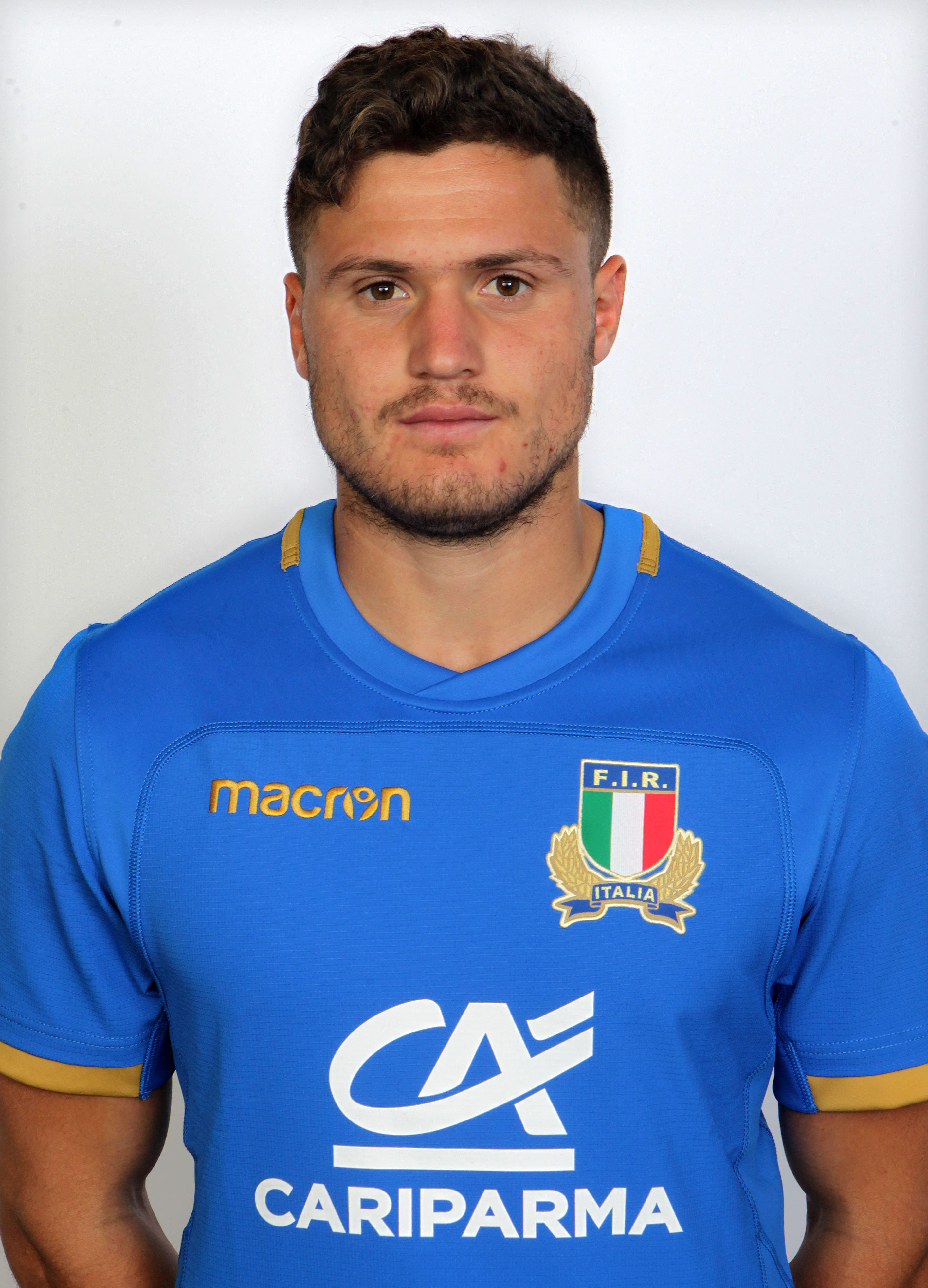 Cariparma Test match 2017, Parma 22/10/2017, raduno Nazionale italiana, profili individuali di atleti e staff, Marcello VIOLI, mediamo di mischia (Zebre Rugby, 5 caps).